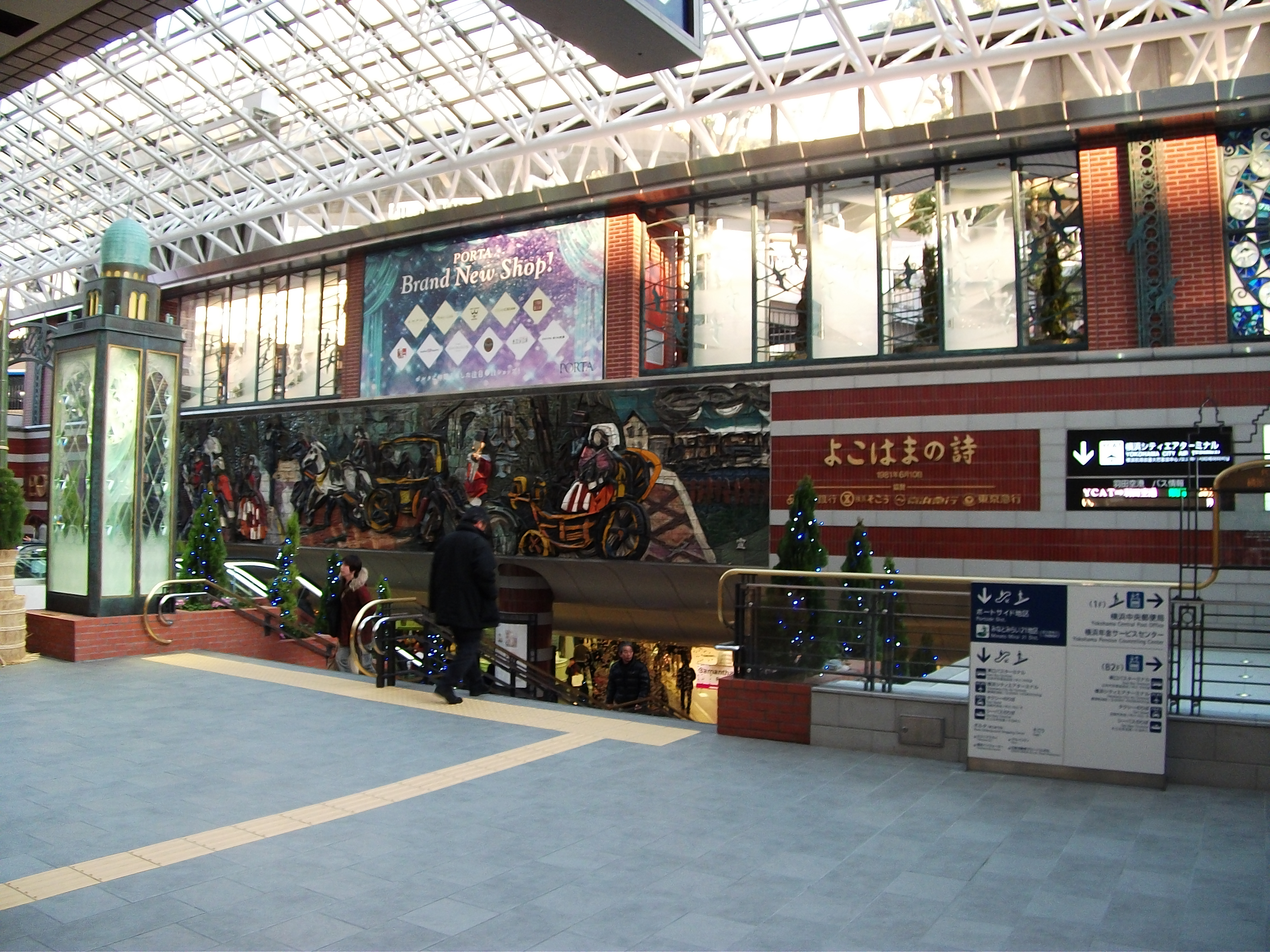 横浜駅東口の地下街横浜ポルタ